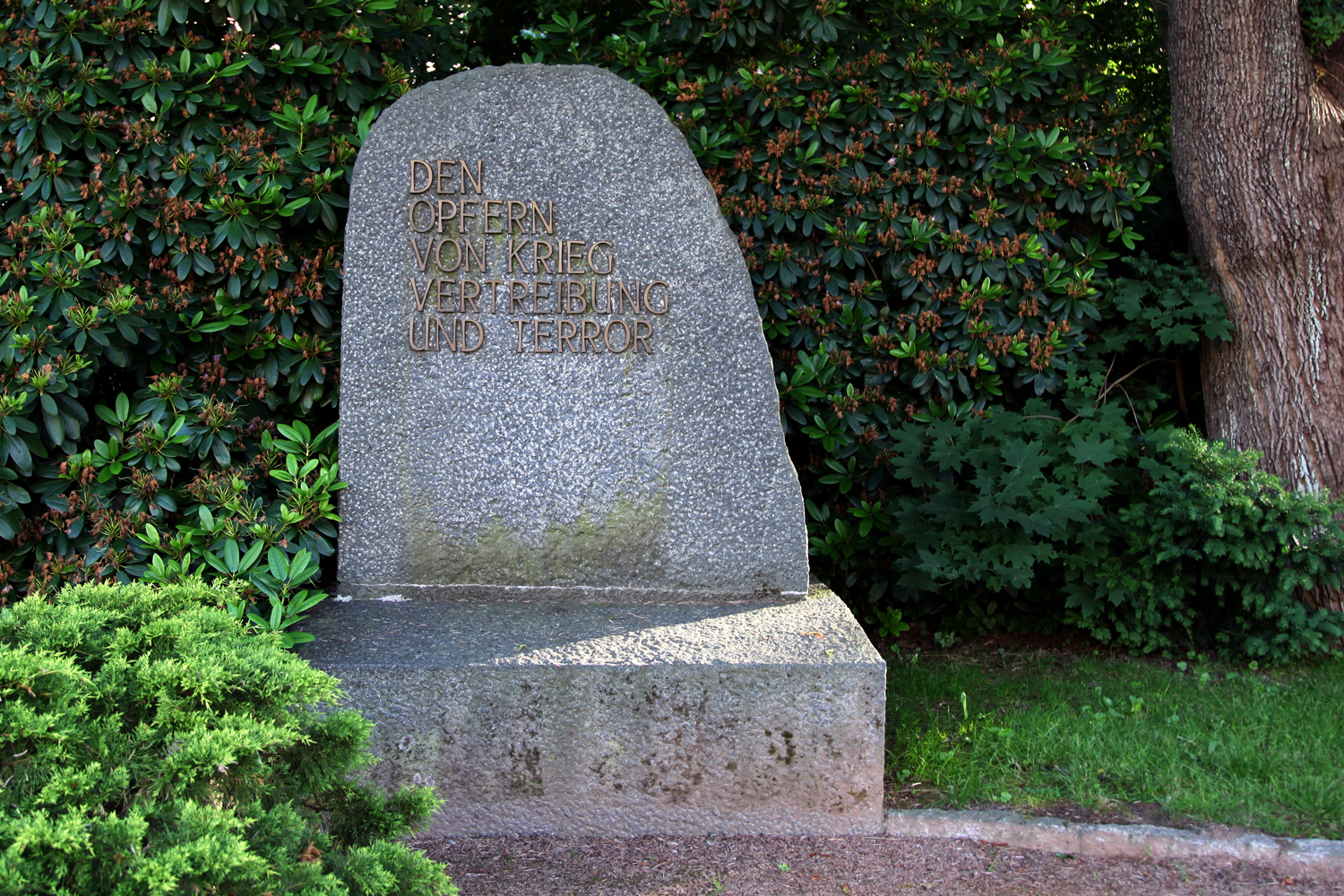 Denkmal in Radeberg gegenüber dem Kaiserhof, "Den Opfern von Krieg, Vertreibung und Terror"